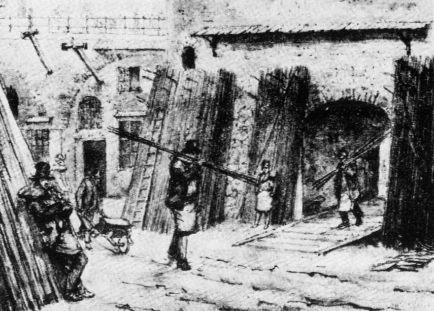 Järnbärare i "Järngraven och passagen till Södermalm"